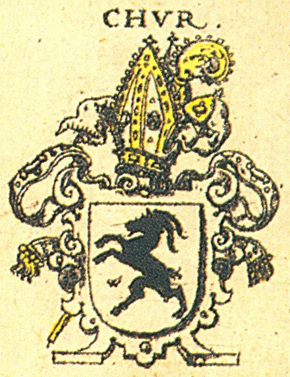 Wappen des Bistums Chur nach Siebmachers Wappenbuch